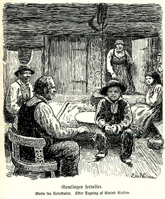 Gamlingen fortæller. Motiv fra Setesdalen. Tegning av Eivind Nielsen